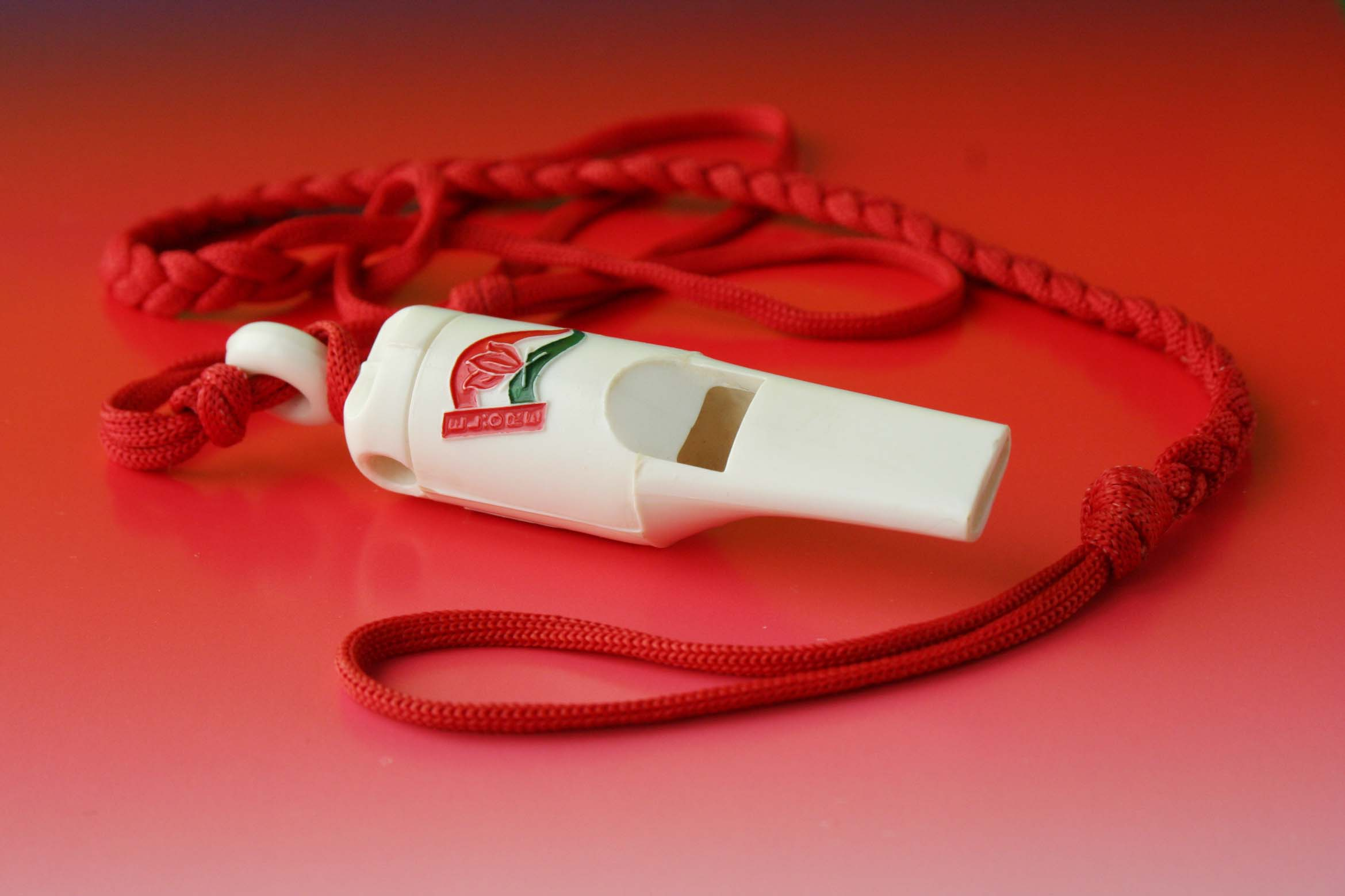 Úttörőmozgalom, úttörősíp 1968 tájáról